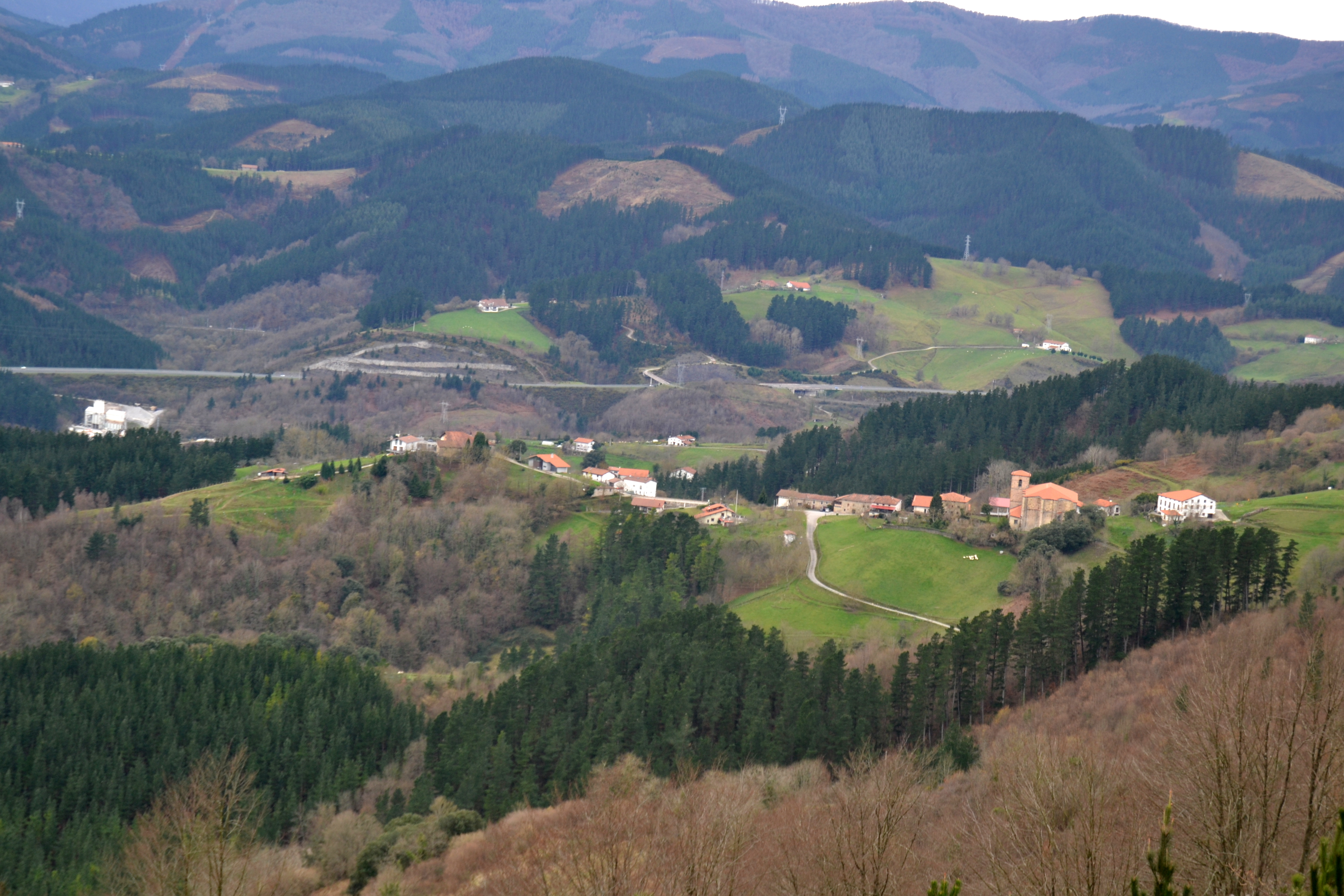 Ezkioren ikuspegia Kizkitza ingurutik. Gipuzkoa, Euskal Herria.